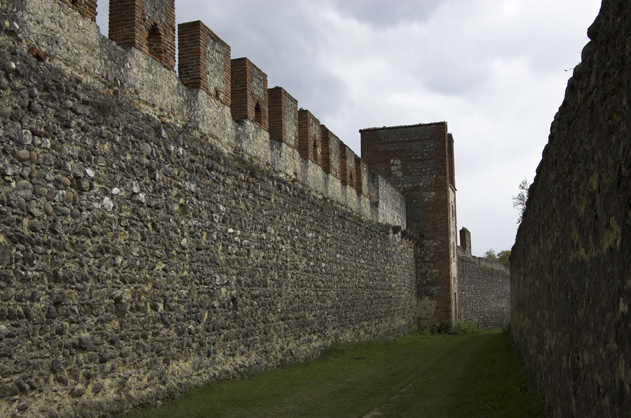 Mura settentrionali di Verona, costruite da Cangrande e ammodernate dagli austriaci nell'Ottocento